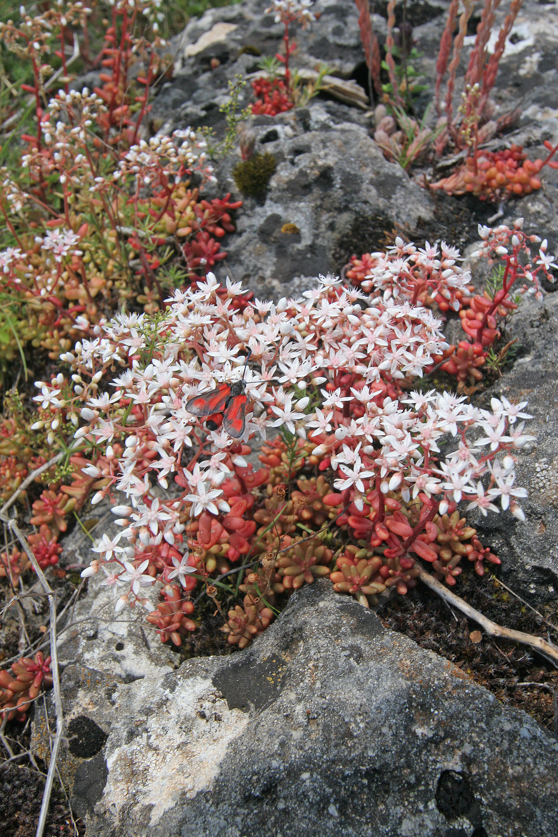 Plants in Gorges du Tarn